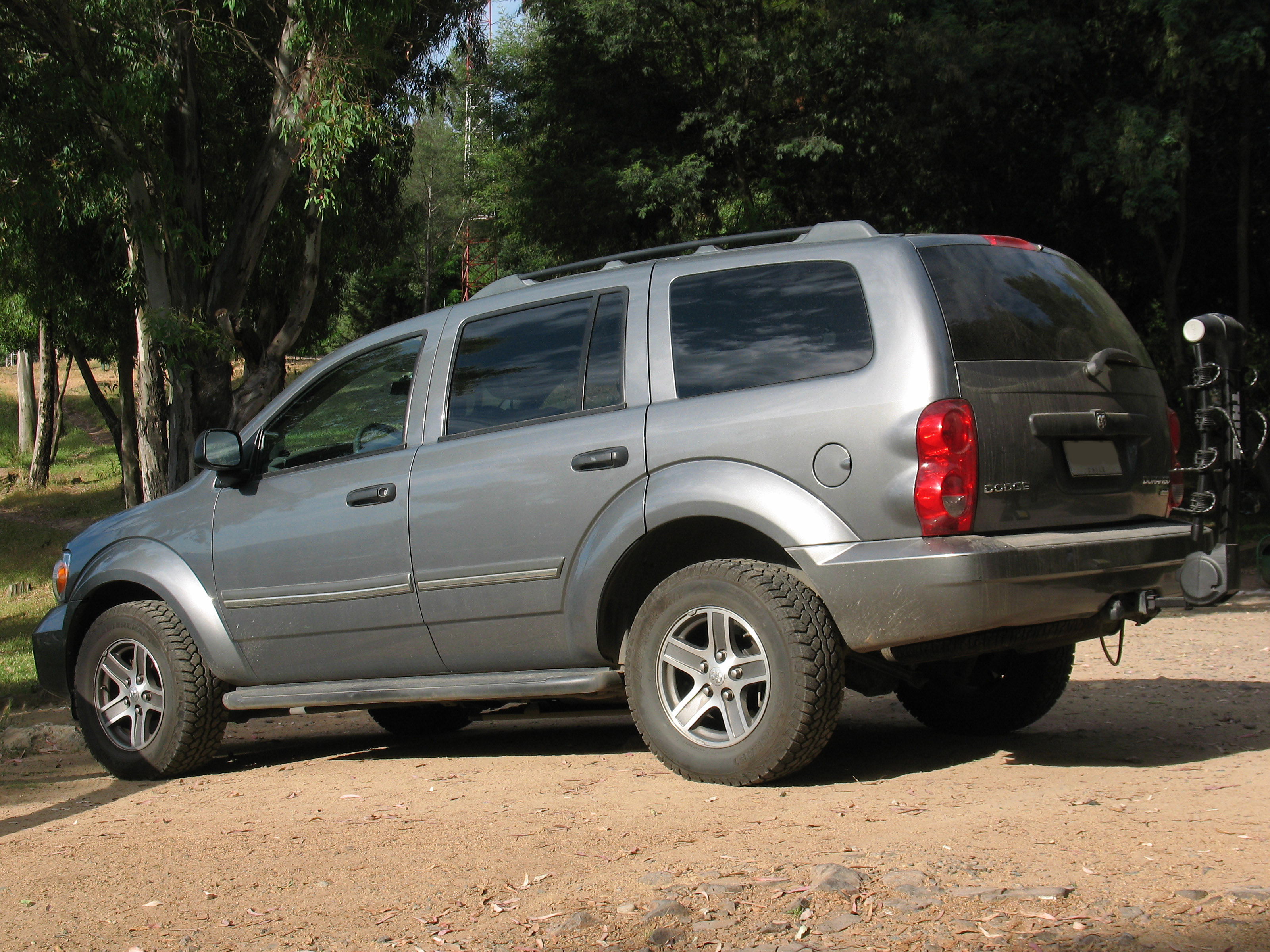 Dodge Durango SLT 2010